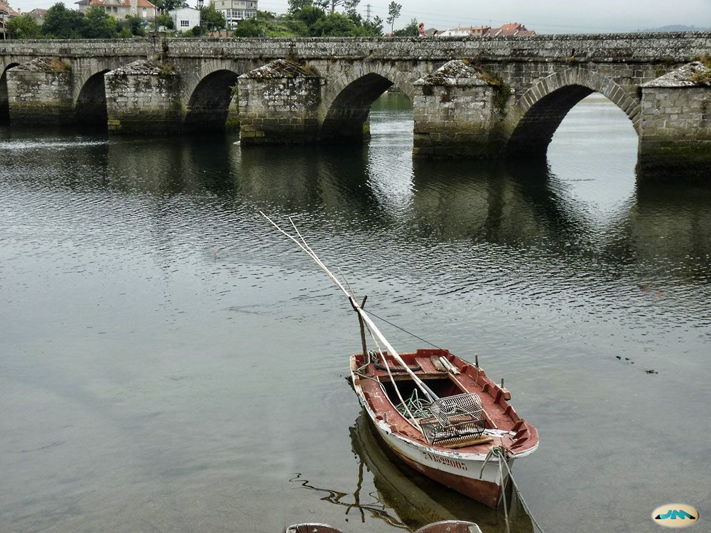 Pontevedra, Pontesampaio